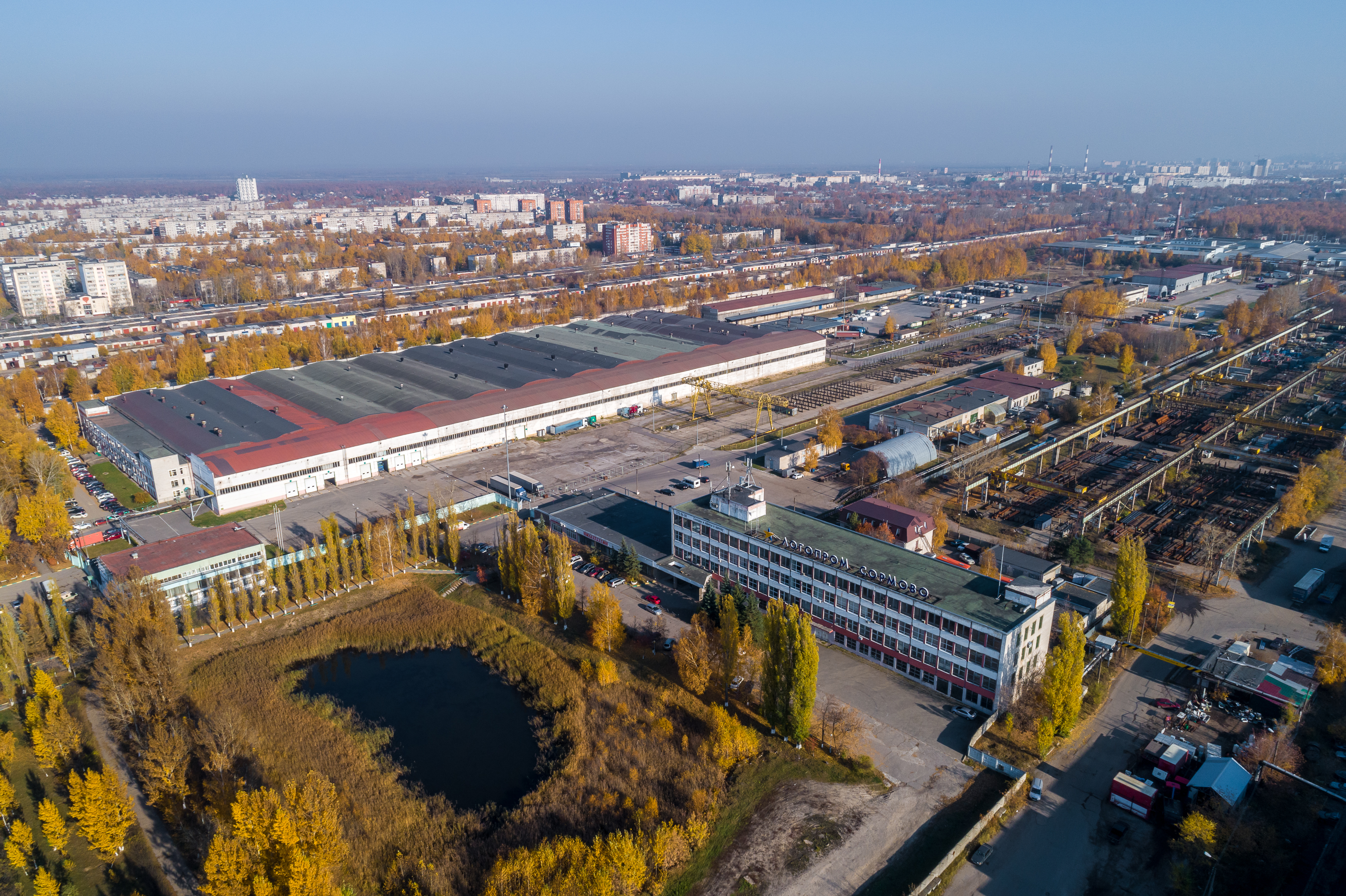 Территория комплекса Логопром Сормово